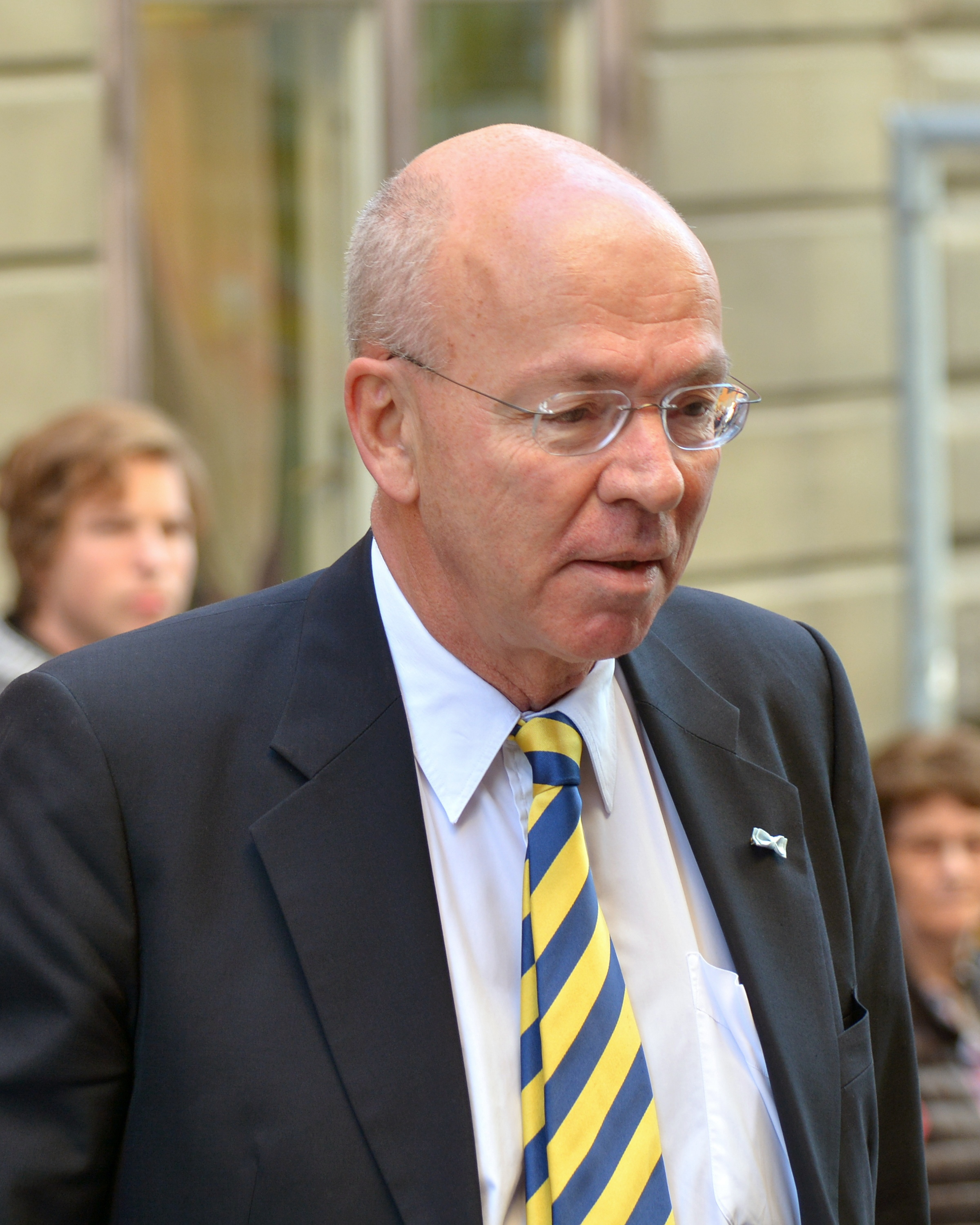 Dag Klackenberg